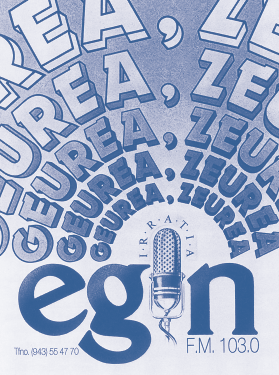 Egin Irratia